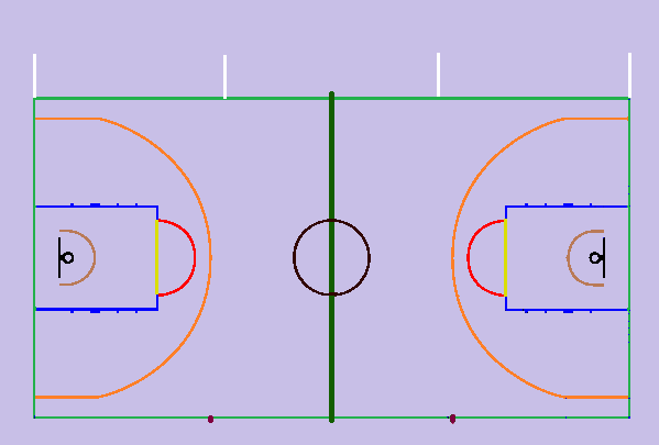 boisko